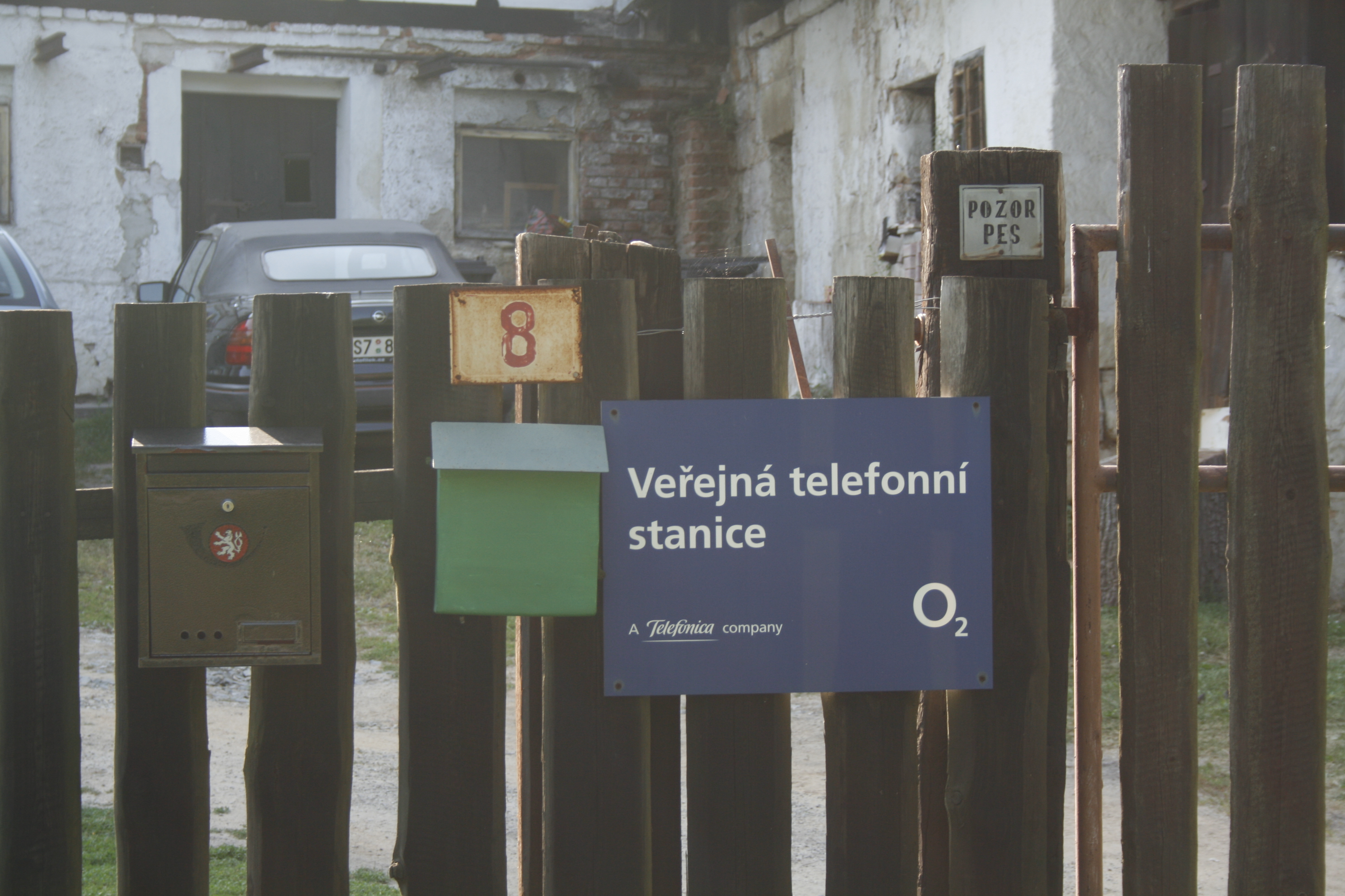 Střezivojice